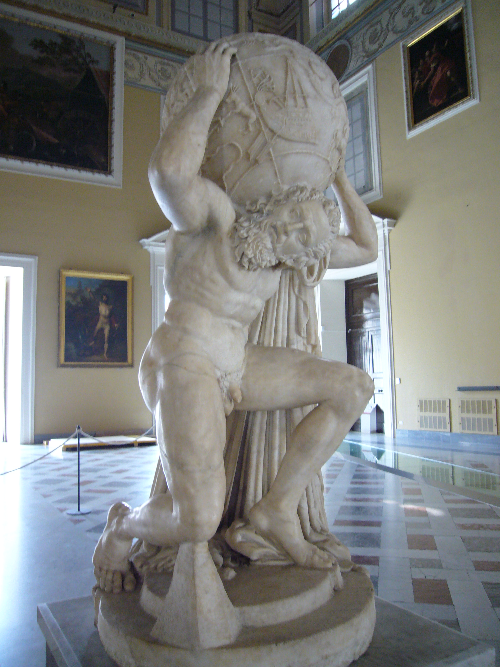 Statua romana di Atlante (sec II d.C.). Già nella Collezione Farnese, oggi al Museo Archeologico Nazionale di Napoli.